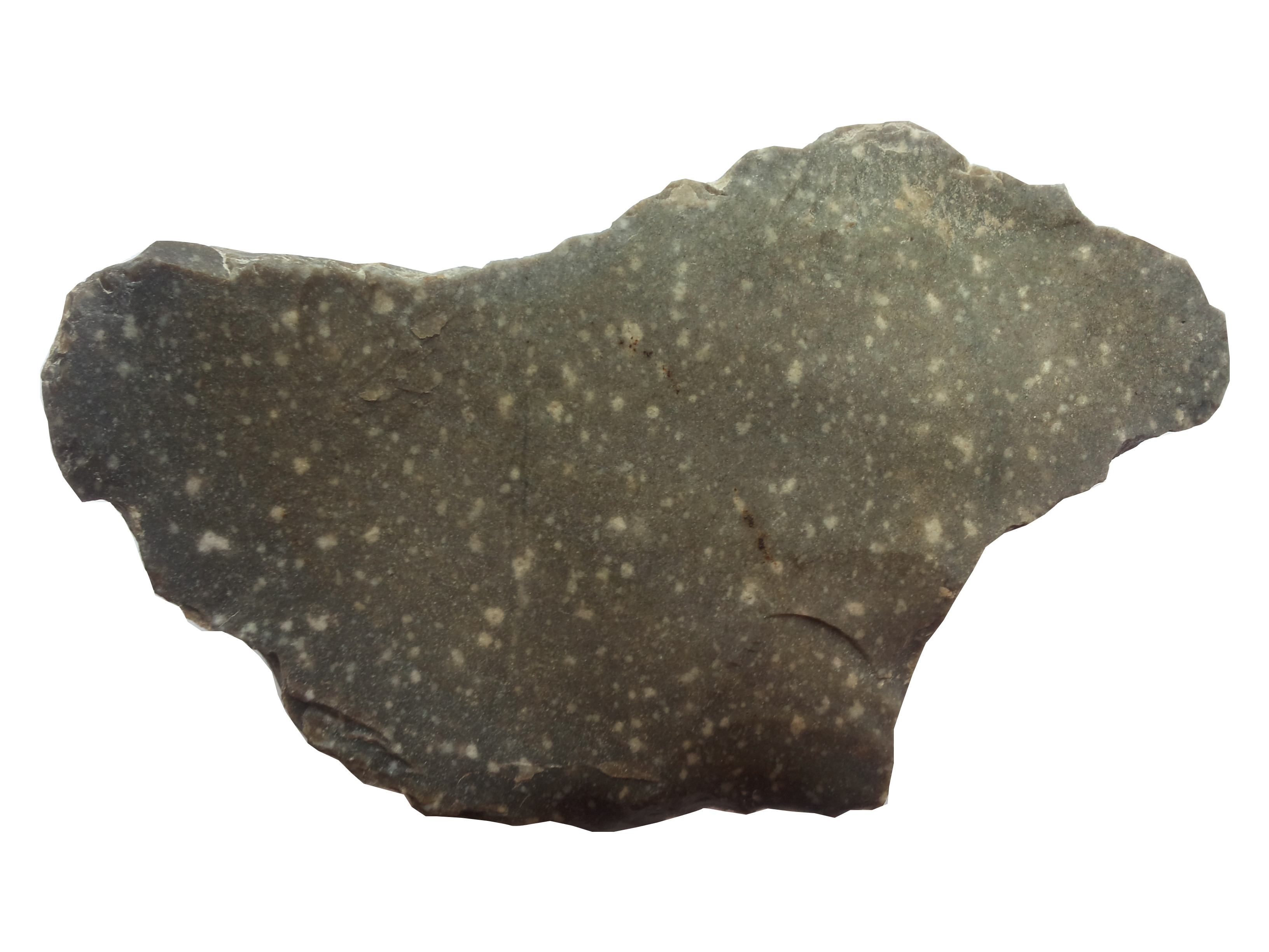 Krzemień z Świeciechowa.